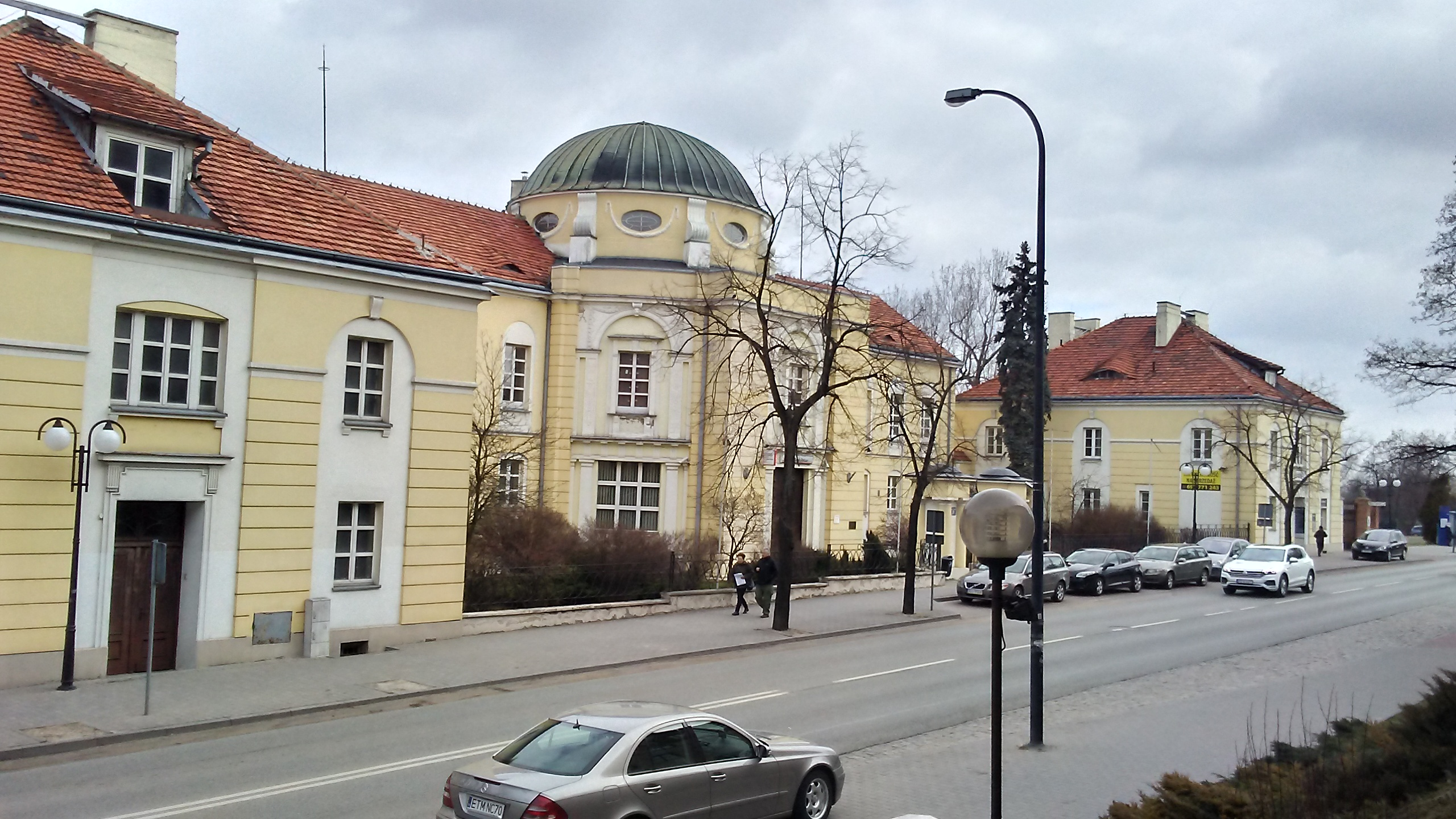 Tomaszów Mazowiecki w województwie łódzkim. Kompleks bankowy Polskiej Kasy Opieki przy ulicy Mościckiego. PL, EU, CC0